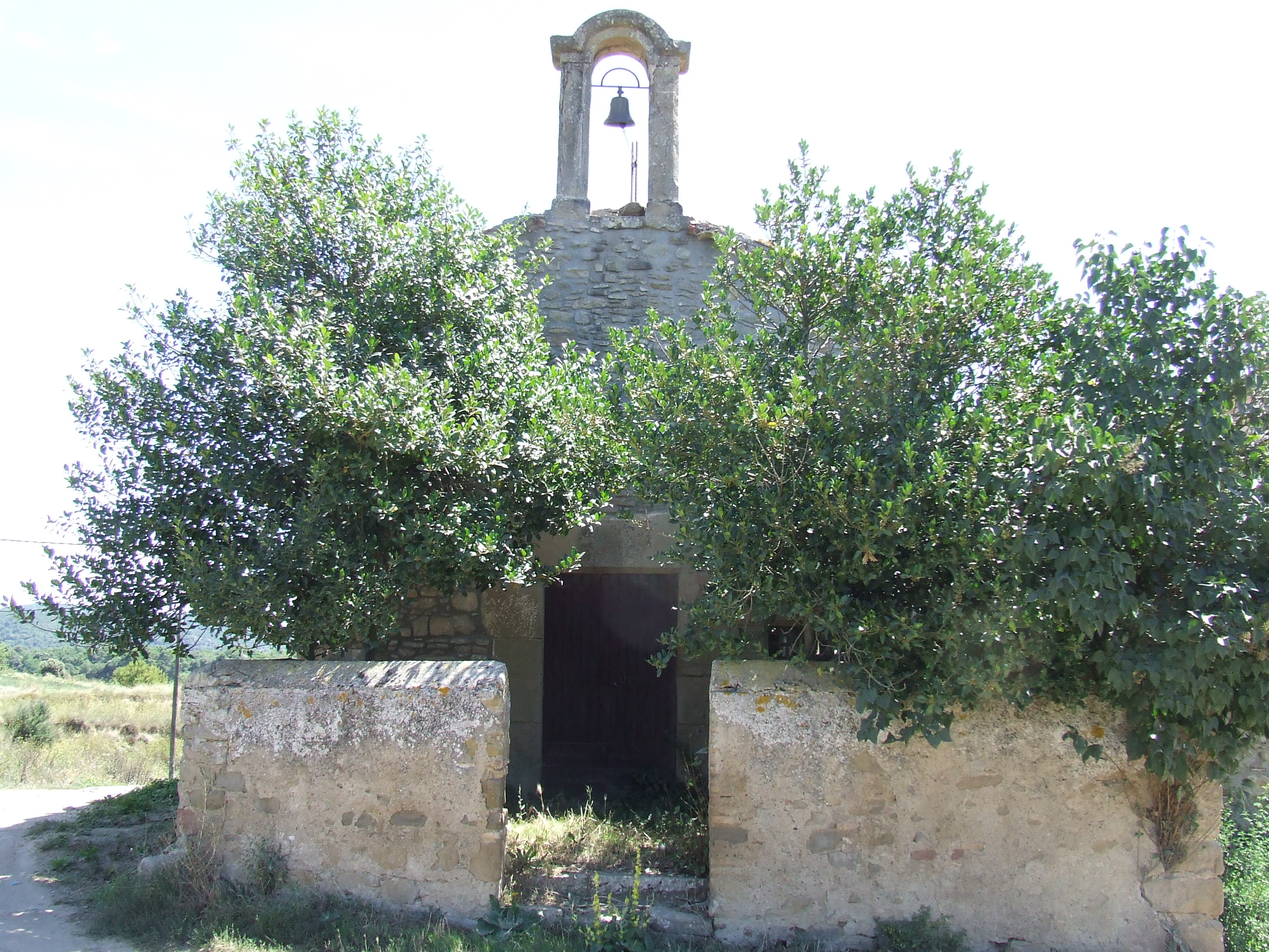 Sant Josep de la Talladella (Castellcir, Moianès)